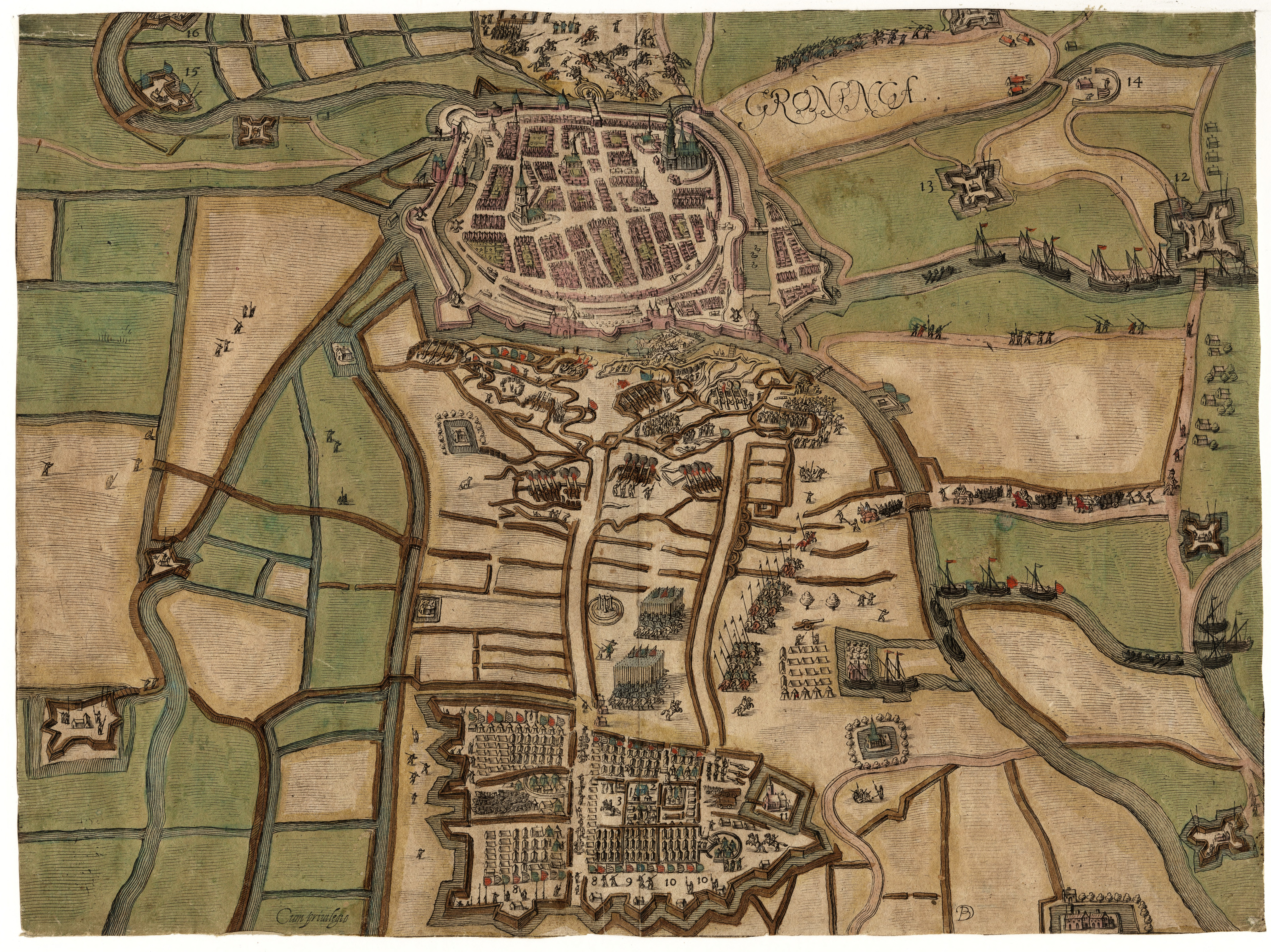 Het beleg van Groningen in 1594 door troepen van Maurits van Oranje. In: Den Nassauschen lauren-crans van Jan Janszoon Orlers, Leiden, 1610, p. 98. Betreft een kopergravure, die is ingekleurd met aquarel. De onderschriften zijn niet meegeleverd bij deze kleurenafbeelding. Deze zijn: 1. Hier lach zijn Excel. commanderende over dit quartier. 2. Dit zijn de Tenten van Graef Willem. 3. Dit zijn de Tenten vanden Grave van Solms. 4. Twaelf Vaendelen Vriessche Soldaten 5. Den Ritmeefter Duvenvoeirde met 8. Vaendelen voet-knechten. 6. Den oversten Veer met 19. Vaendelen voetknechten. 7. Alderhande ammonitie ende crijchs-rustinge. 8. Den Grave Eberhard van Solms met 18. Vaendelen duytsche lants knechten. 9. Den Colonel More met 10. Vaendelen voetknechten 10. Graef Philips van Nassau met 10. Vaendelen voet-knechten. 11. De mineerders ende bevel-hebbers vande Schanssen ende loopgraven. 12. Een Vaendel Vriessche Soldaten. 13. Noch een Vaendel Vriessche Soldaten. 14. Noch een Vaendel Vriessche Soldaten. 15. Noch een Vaendel Vriessche Soldaten. 16. Vier Vriessche Vaendelen. De Ruyterie onthiel haer achter het Leger in eenen Legher bysonder. Alle dese an der Schanssen waren ooc beset met Ruyters ende knechten.